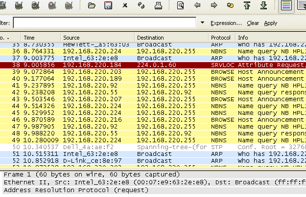 Captura de Wireshark